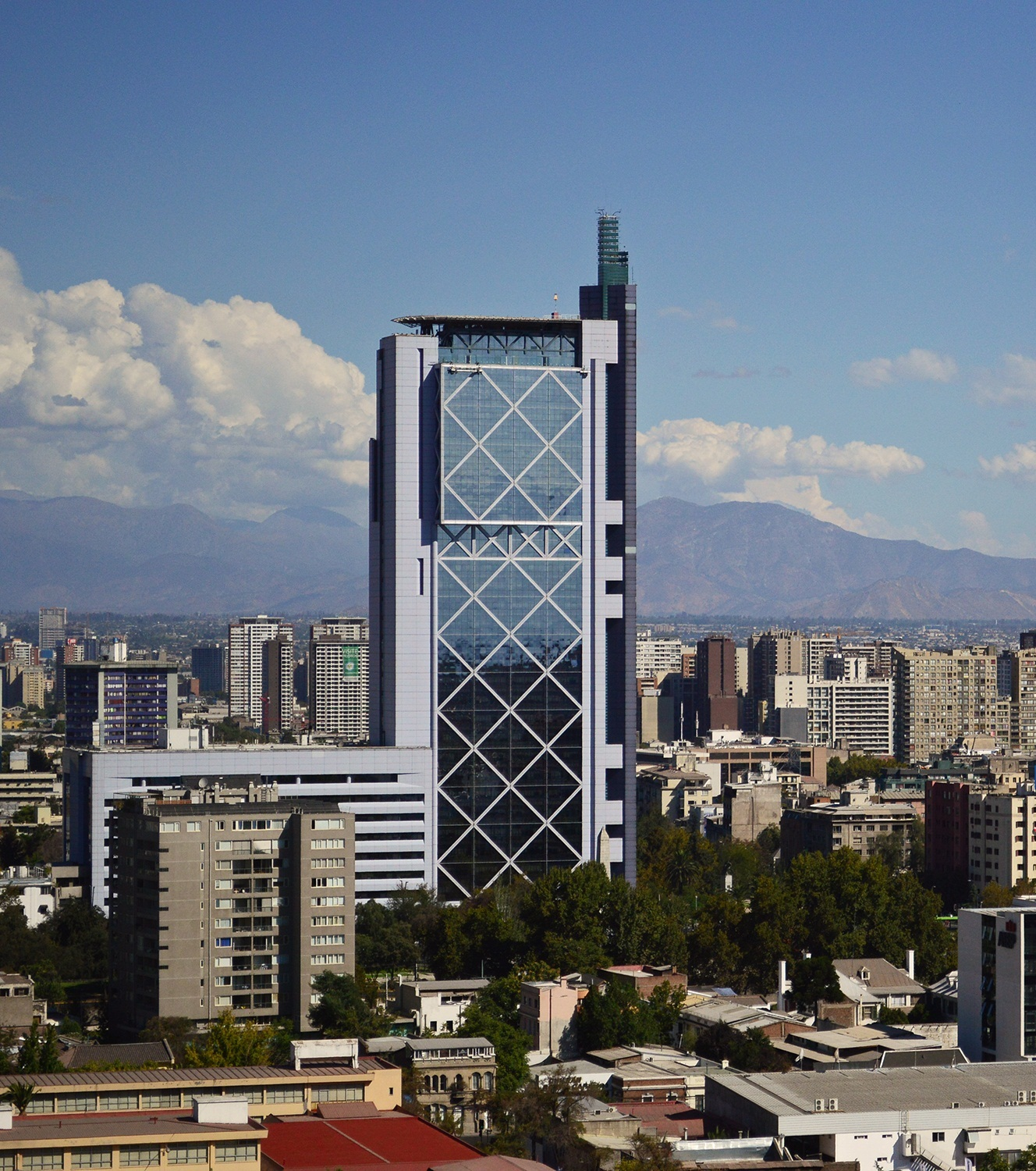 Torre Telefónica Chile, localizada en la ciudad de Santiago de Chile.